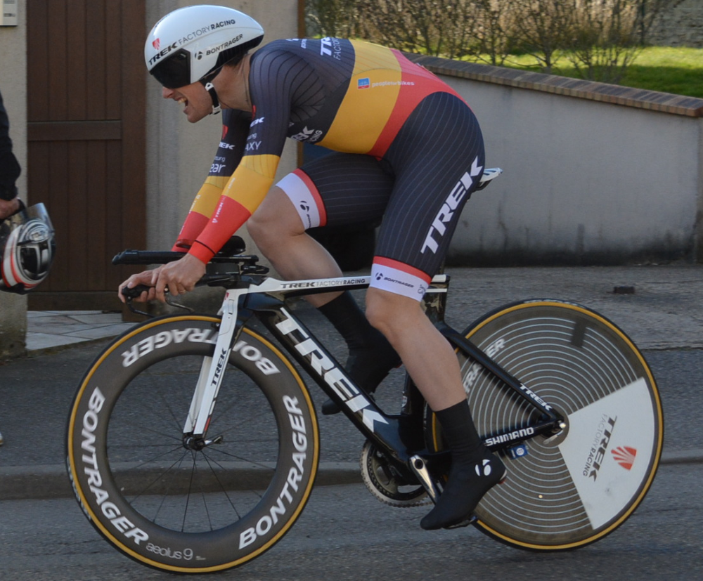 Kristof Vandewalle à Paris-Nice 2015